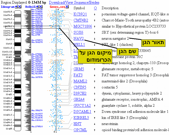 מיפוי כרומוזום 11 - מתוך NCBI - עם הסברים (הערה: בתמונה נחתכו מספר עמודות לא רלוונטיות)